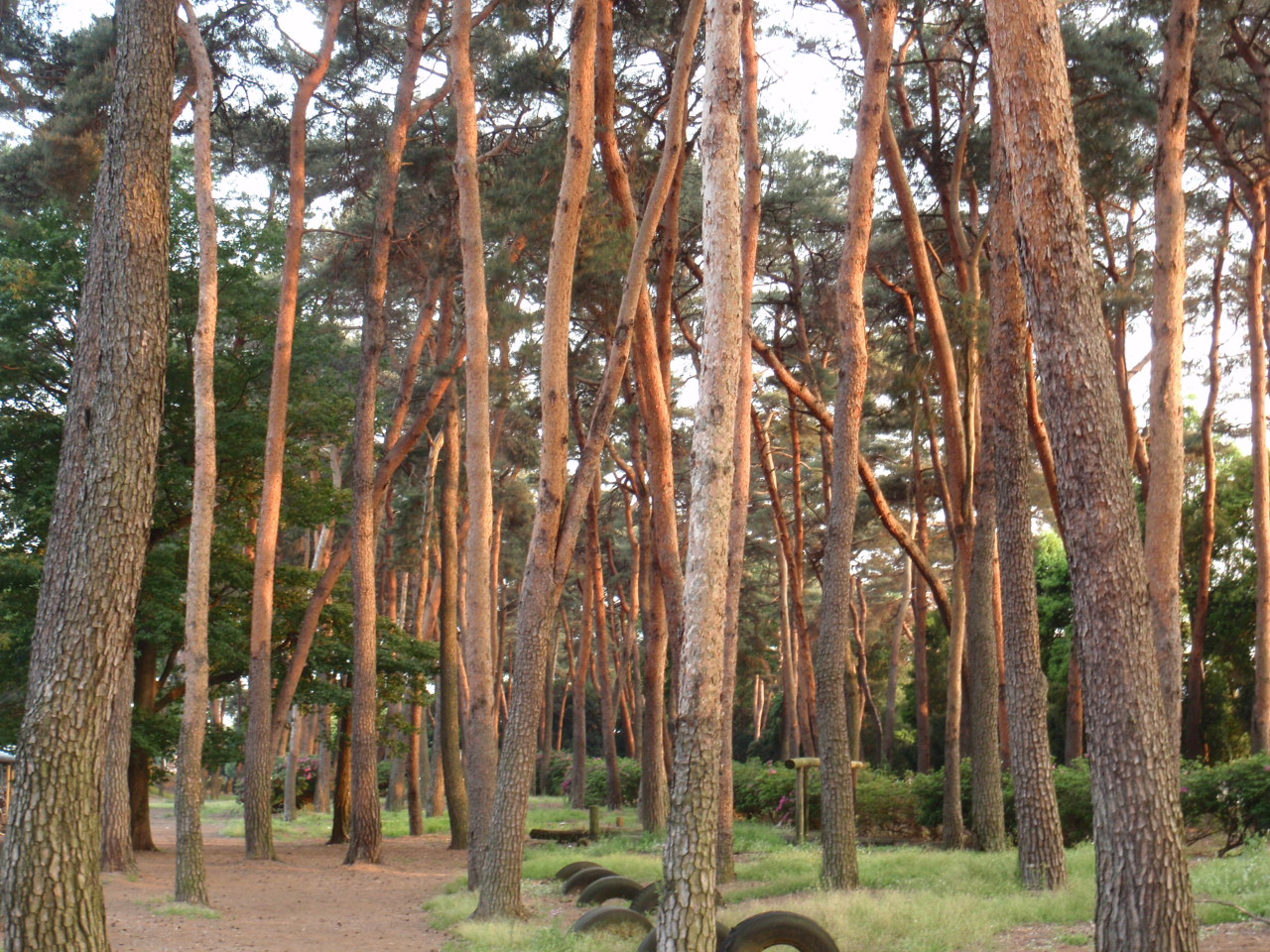 館林高松林